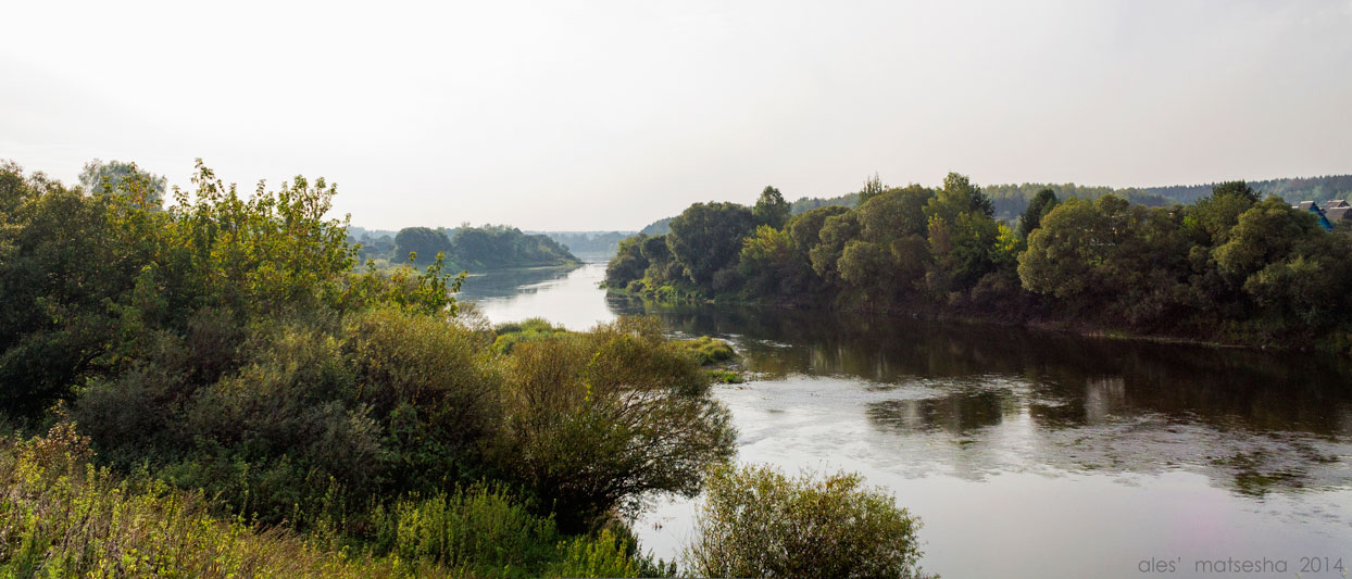 Гацькаўшчына. Крапівенскае поле, месца бітвы пад Оршай 1514 г.